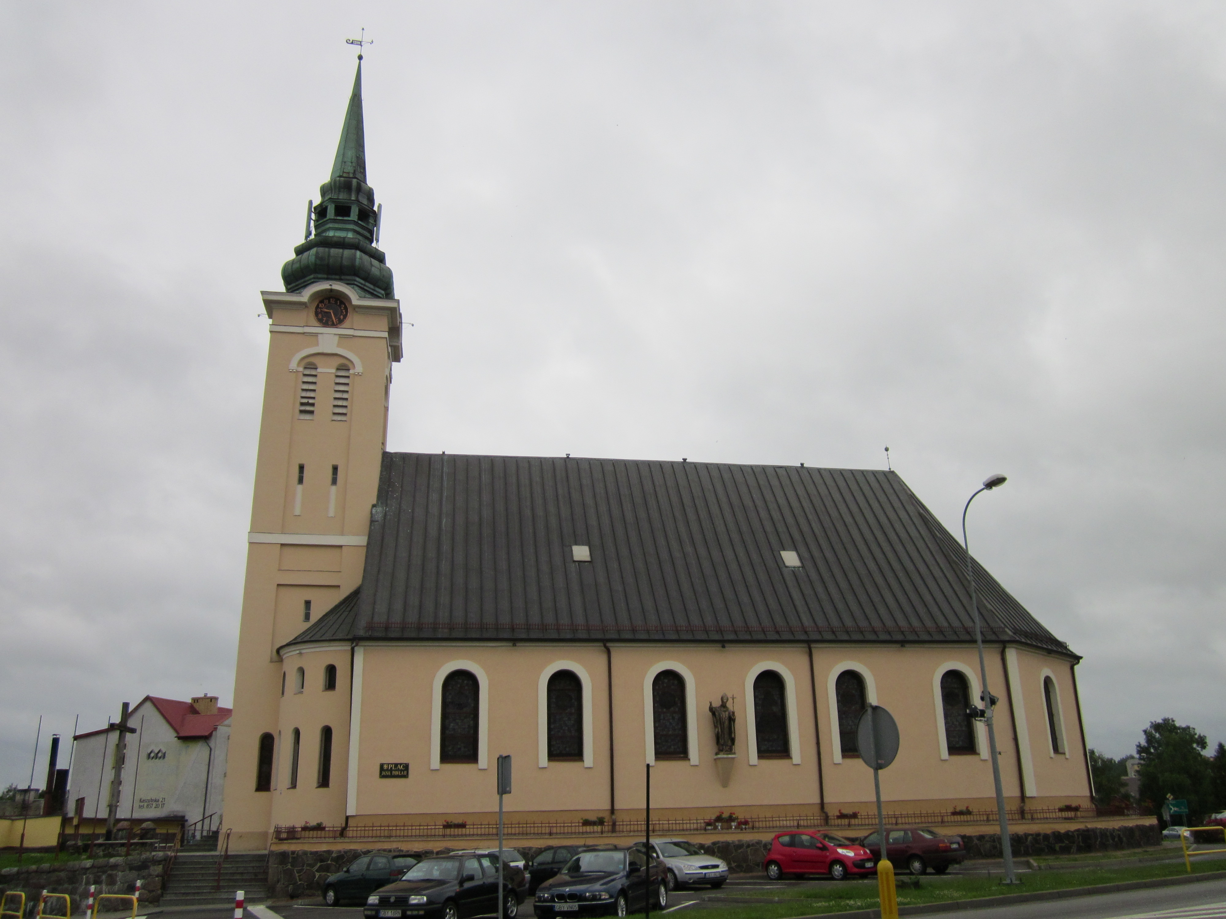 Miastko, ul. Królowej Jadwigi - dawny kościół ewangelicki, obecnie rzymskokatolicki kościół parafialny p.w. NMP Wspomożenia Wiernych, 1730, 1905